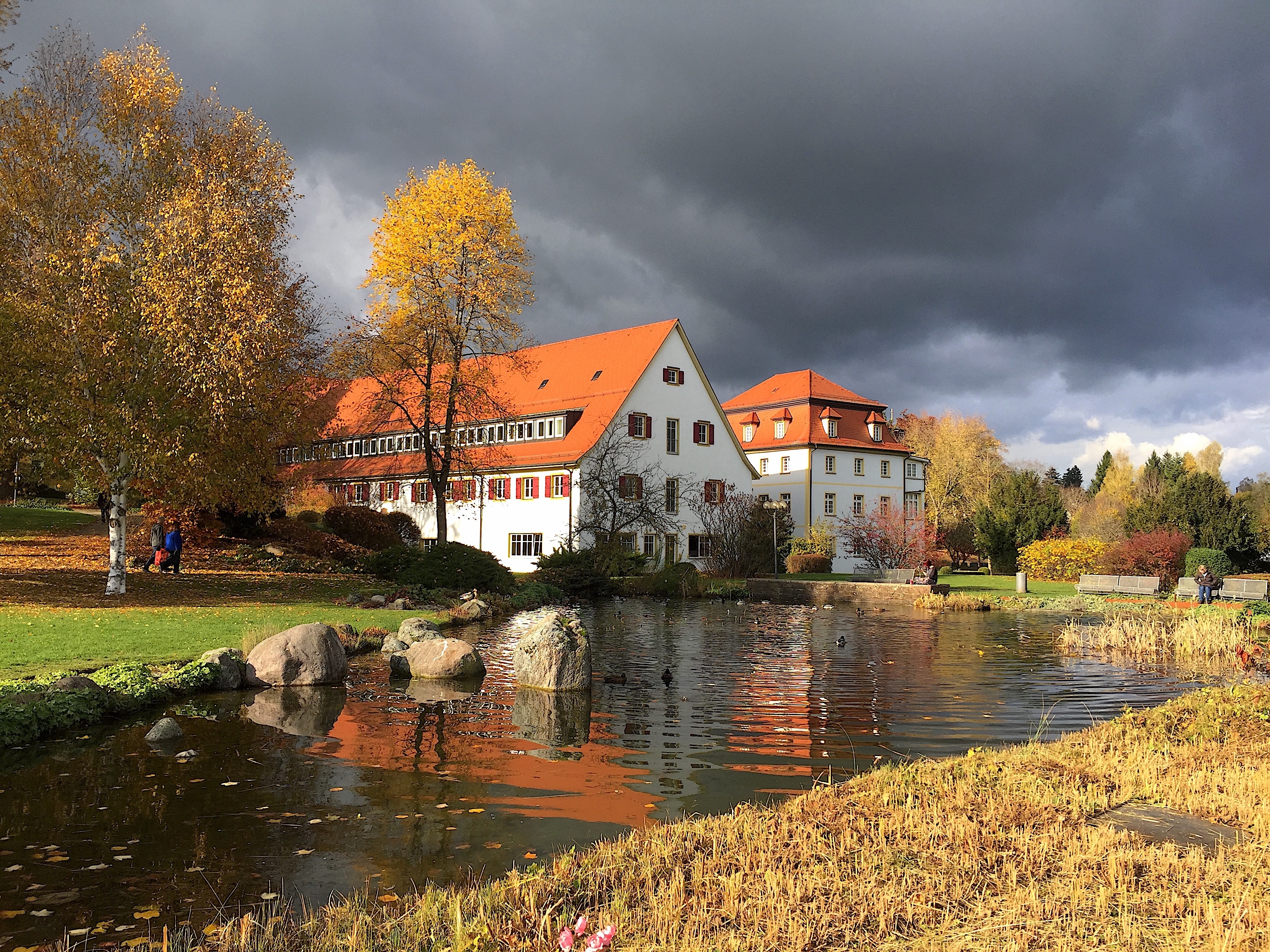 Park des Vinzenz-von-Paul-Hospitals Rottweil (Blick zu den Kaufmännischen Häusern)